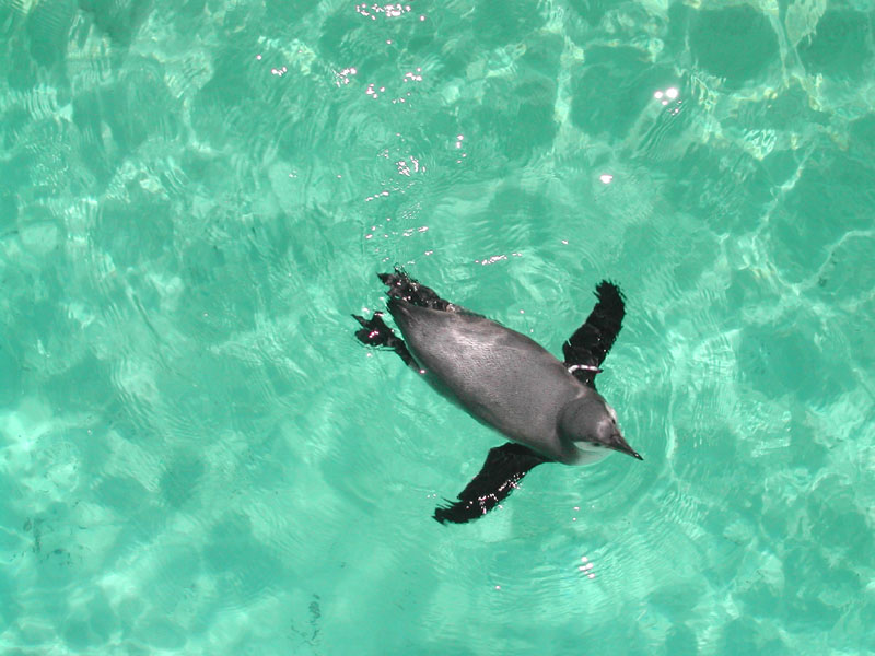 Pinguin im neuen Polarium im Tiergarten Schönbrunn